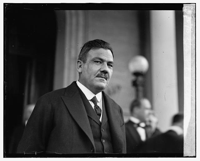 Gen. P.E. Calles, [10/31/24]